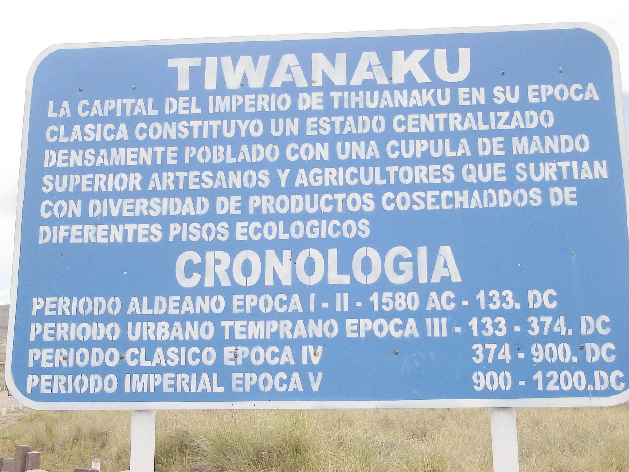 Foto tirada por mim, em Tiwanaku.